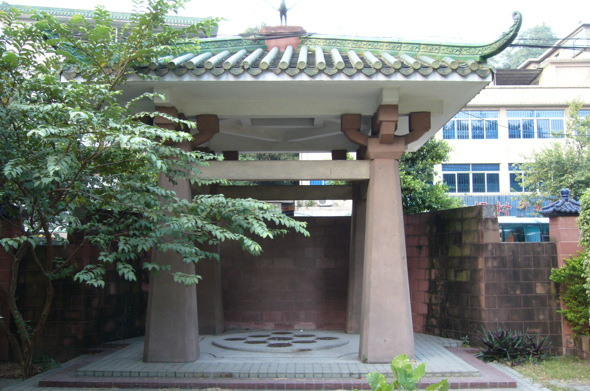 位于广州市应元路的越王井